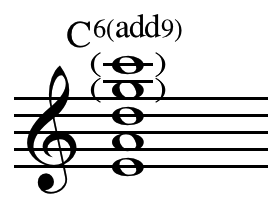 En C6add9 akkord opbygget af kvartstabler i et nodesystem